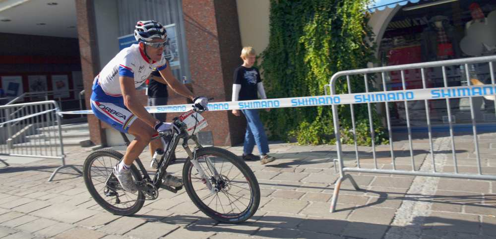 Julien Absalon en 2009 à la manche de coupe du monde de Schladming.